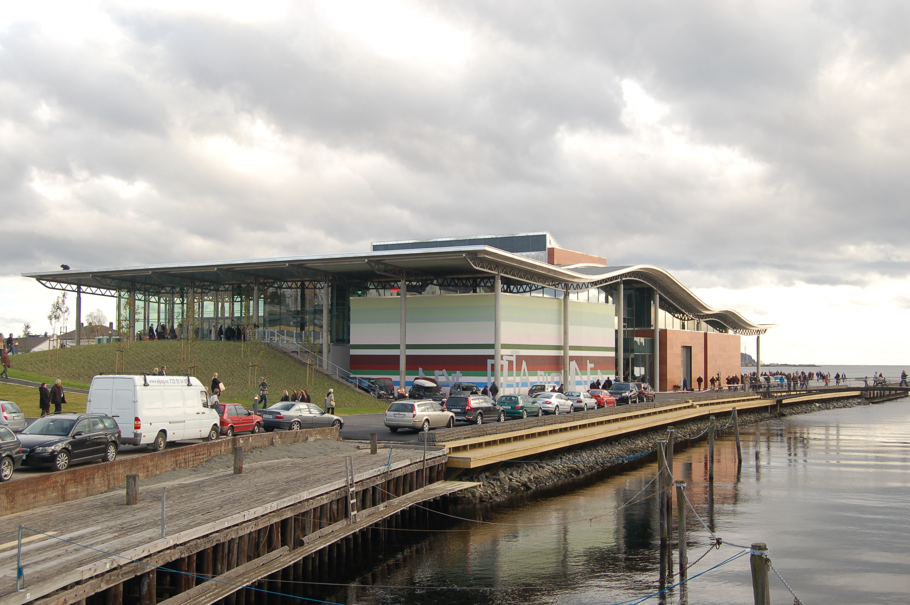 Kulturhuset Bølgen (Bølja), Larvik, ved den offisielle åpningen 10.10.2009